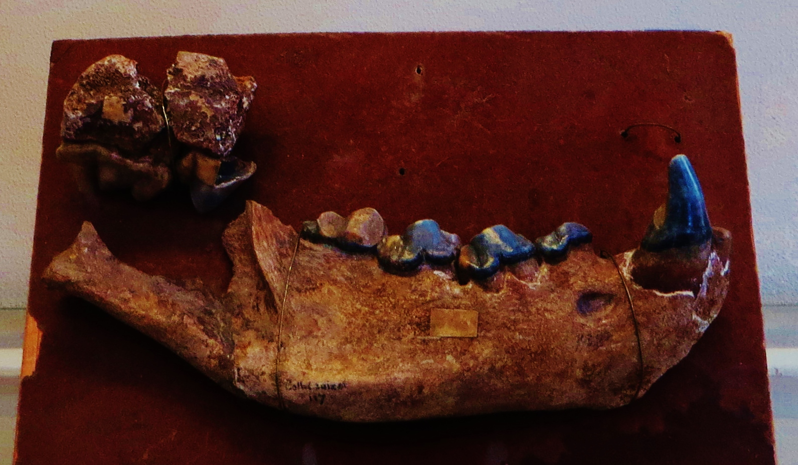 Fossil of Pliocrocuta, an extinct mammal - Took the photo at Musee d'Histoire Naturelle, Paris